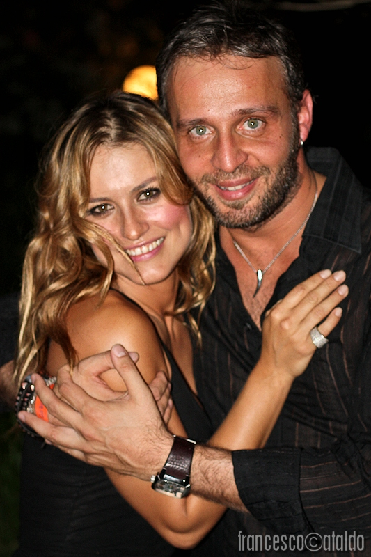 Lola Ponce e Giò di Tonno